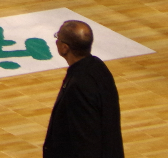 ｂｊリーグ 2013-2014シーズン プレイオフ ファイナルズ_014